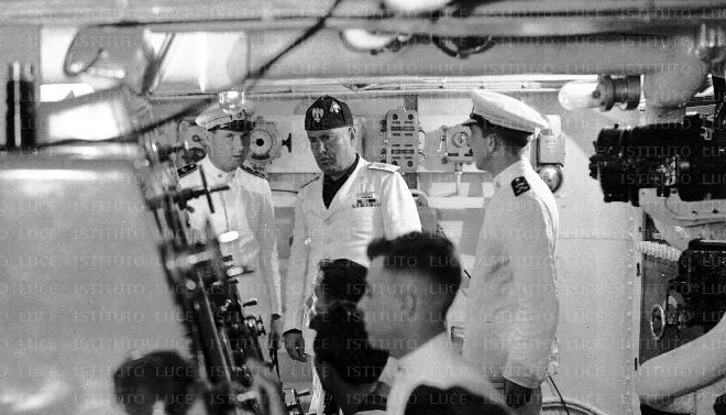 Mussolini visita l'incrociatore Pola nel 1937